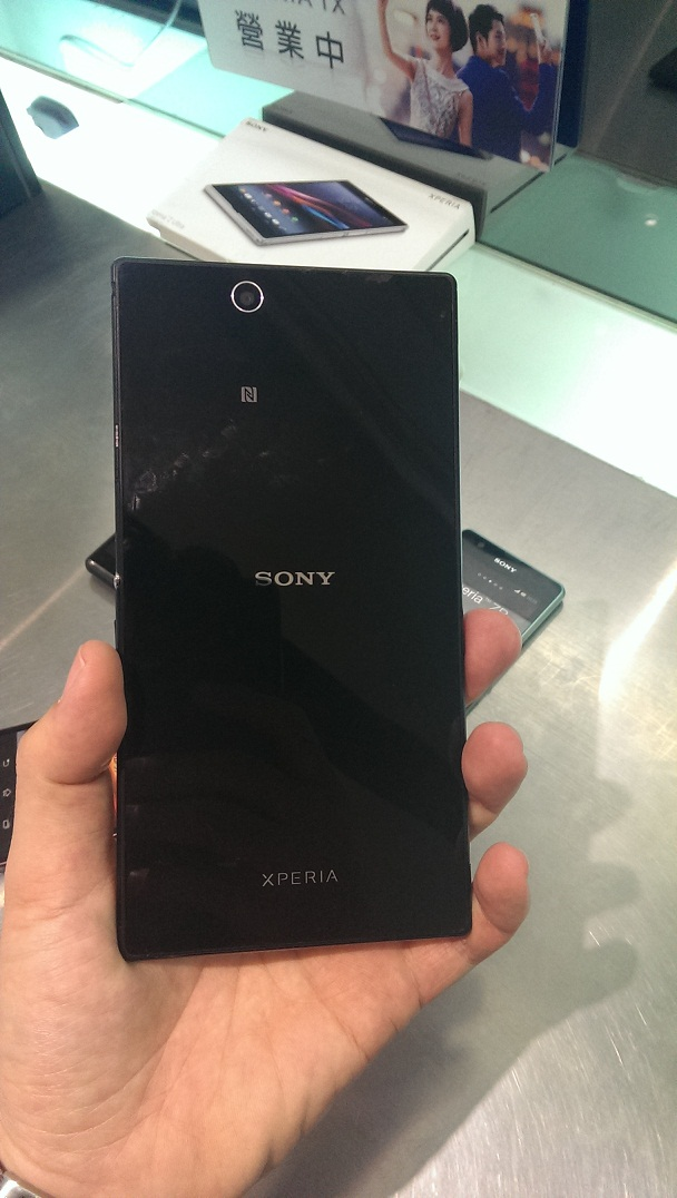 위 사진은 Sony Xperia Z Ultra back 로서 사진을찍으신분이 위키미디어에 업로드를 원하시고 위키미디어에 파일이 공유되는것을 원하여 합의 후 올림